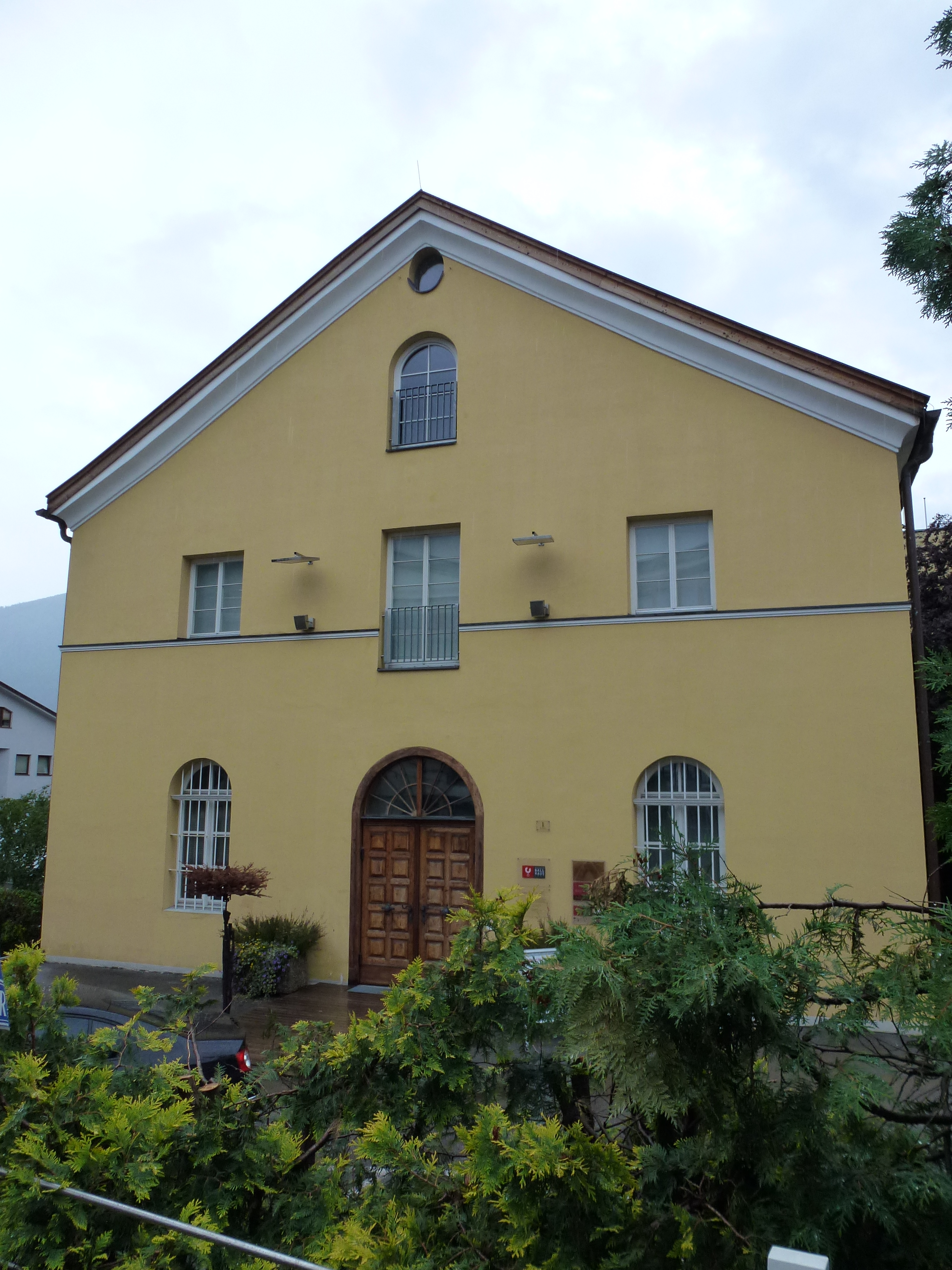 Museum im Ballhaus - Ballgasse 1, Imst